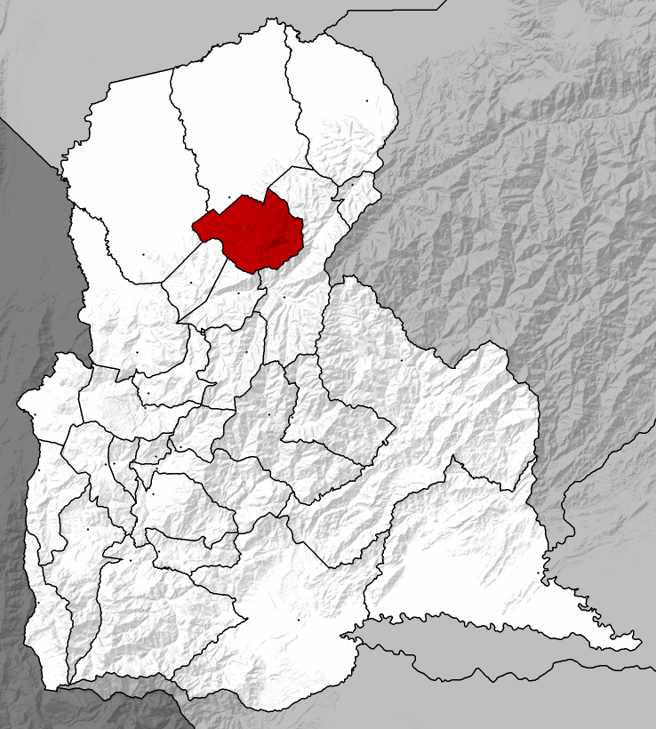 Municipio San Judas Tadeo - Táchira